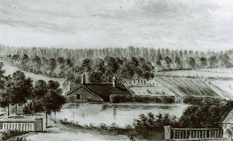 Hammarsmedjan i Nykvarn. Målning av Per Hilleström d.y. ”Utsigt vid Nykvarn” Gjord på 1830-talet